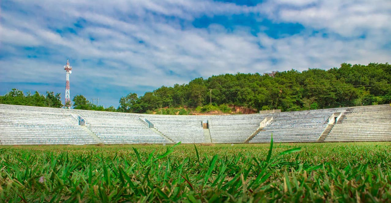 Estadio Tuxtepec Gustavo Pacheco Villaseñor